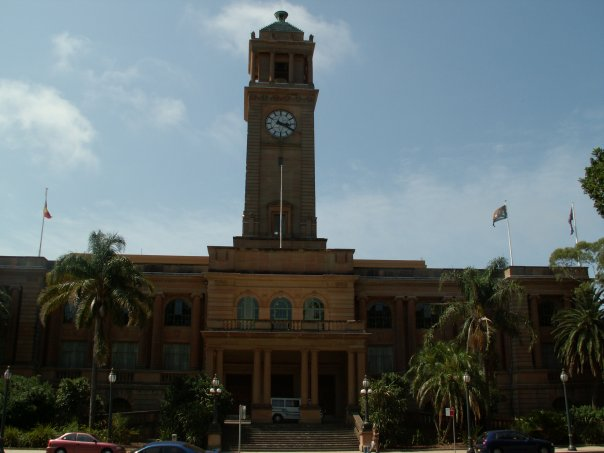 Newcastle, New South Wales Australia (2008)